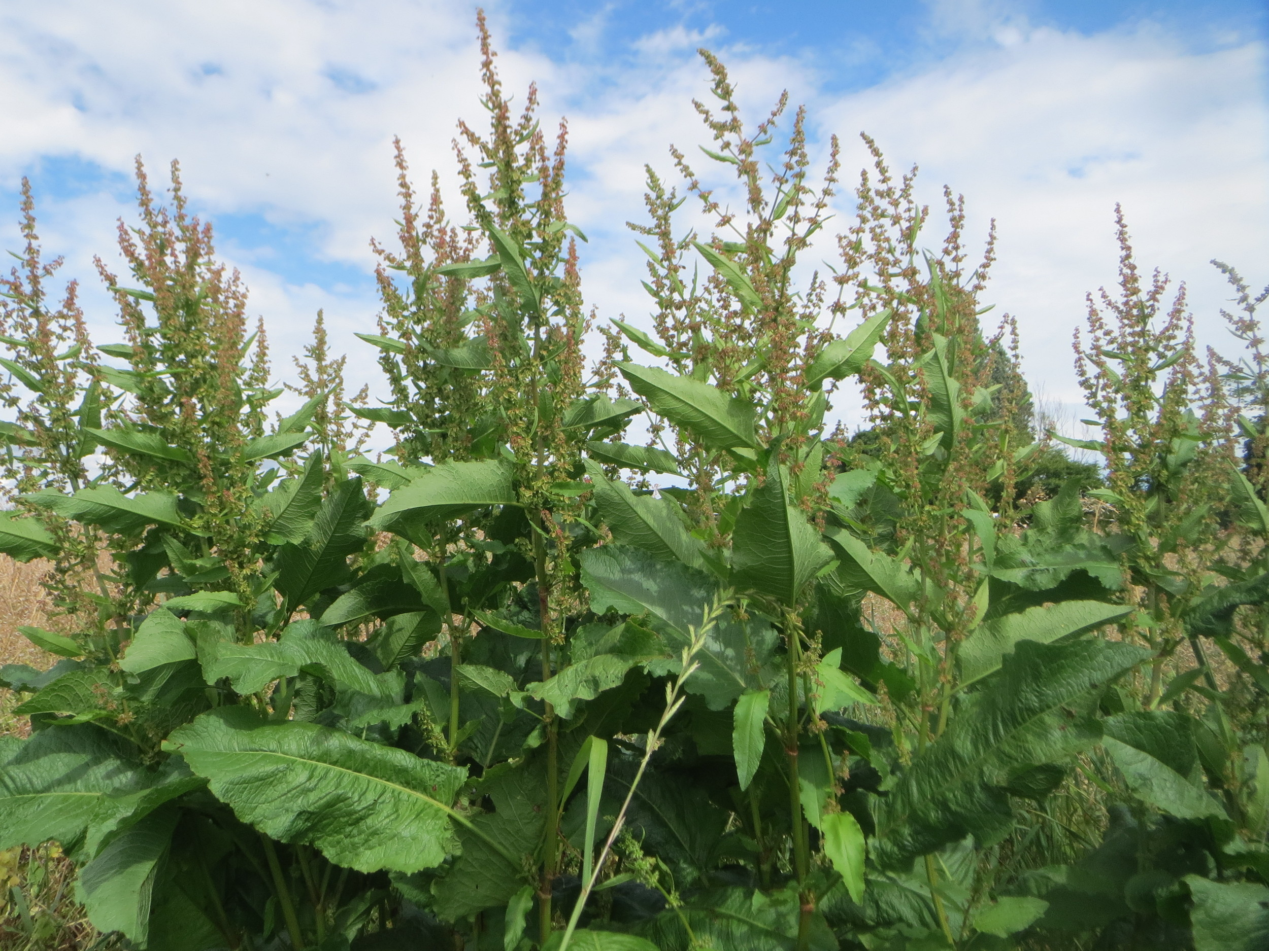 Stumpfblättriger Ampfer (Rumex obtusifolius) auf einer Wiese zum Schutz der Haubenlerche am Stadtrand von Hockenheim